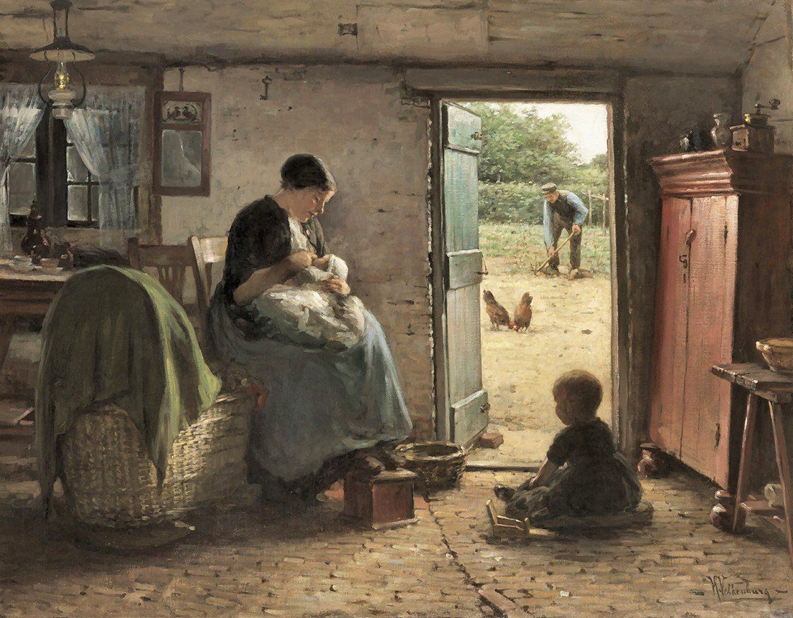 Familie idylle